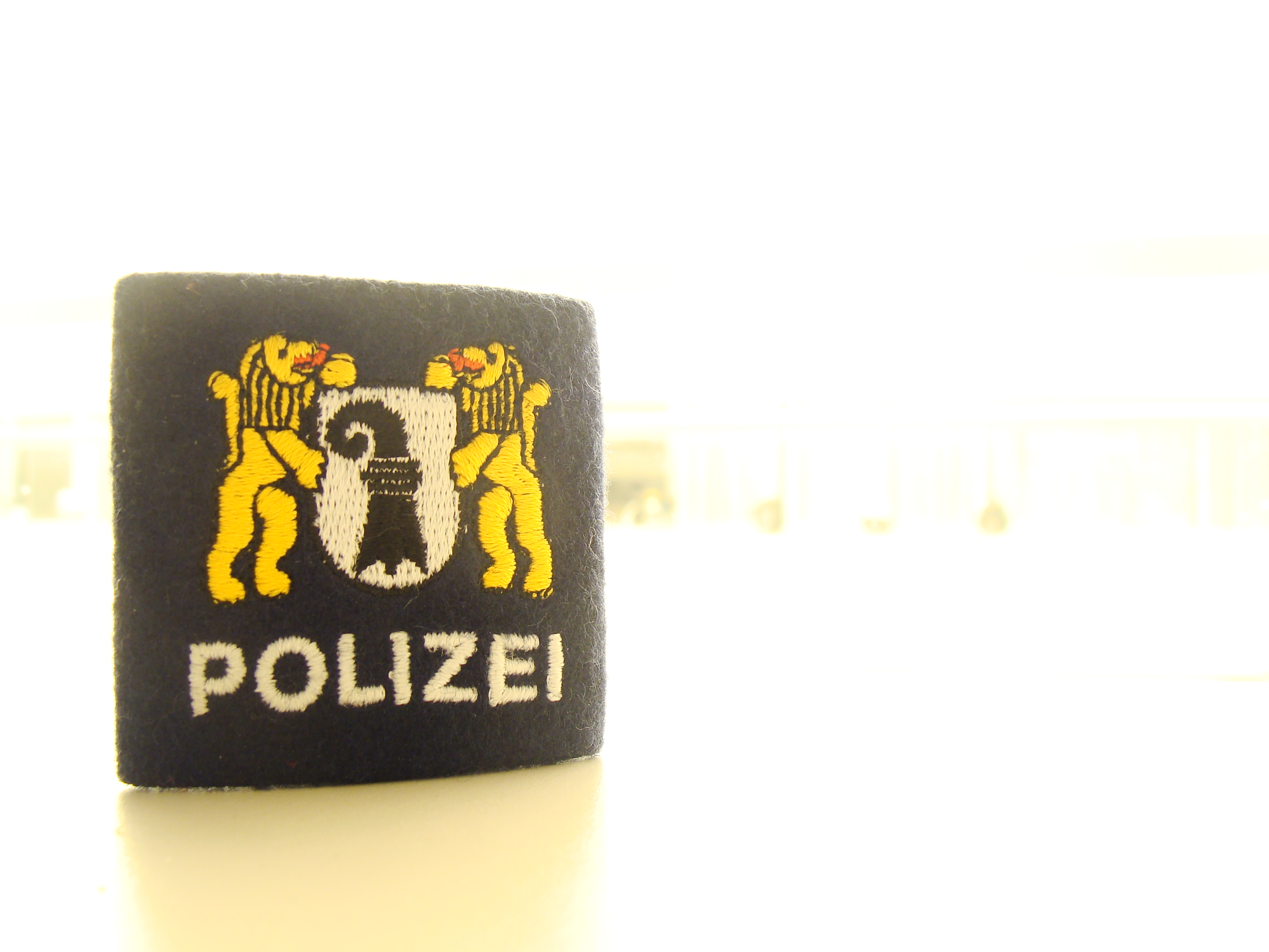 Schulterabzeichen